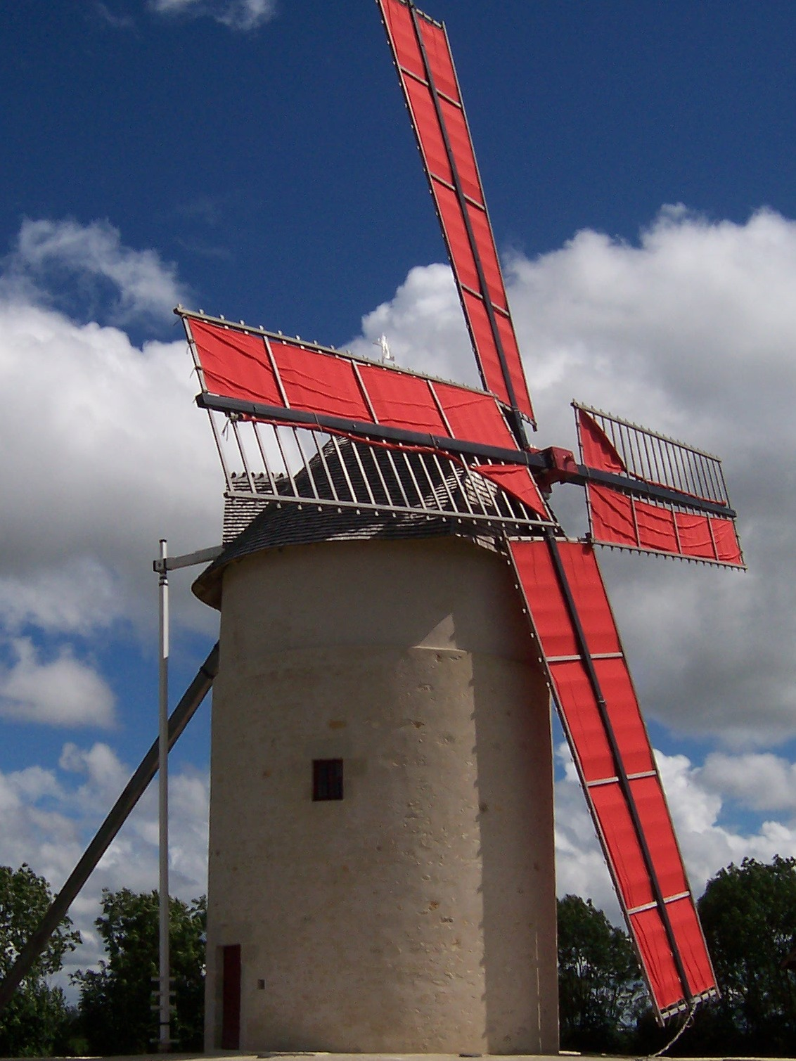 Wind mill Les Eventées in Saint-Pierre-le-Moûtier (Nièvre)